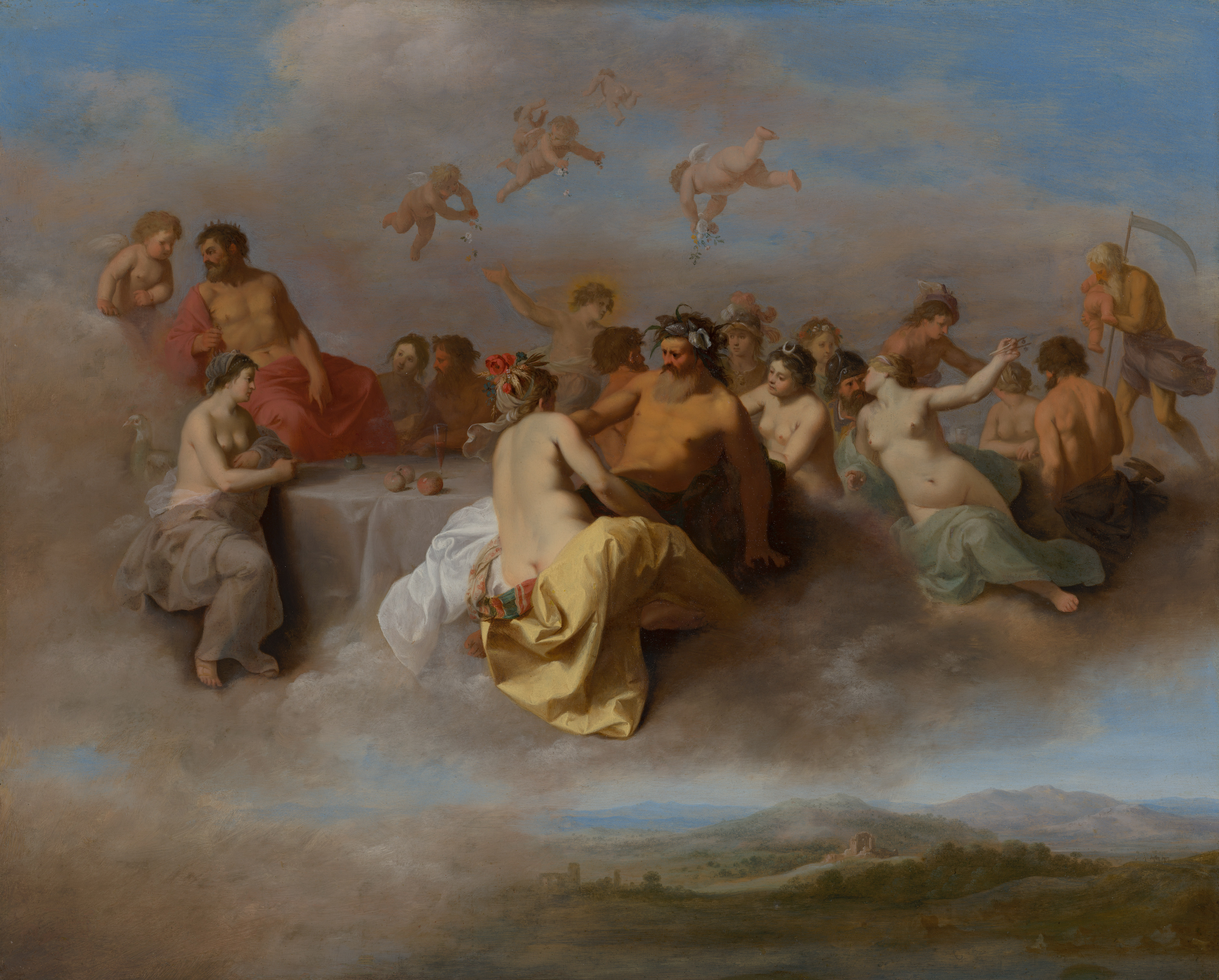 38 × 49 cm